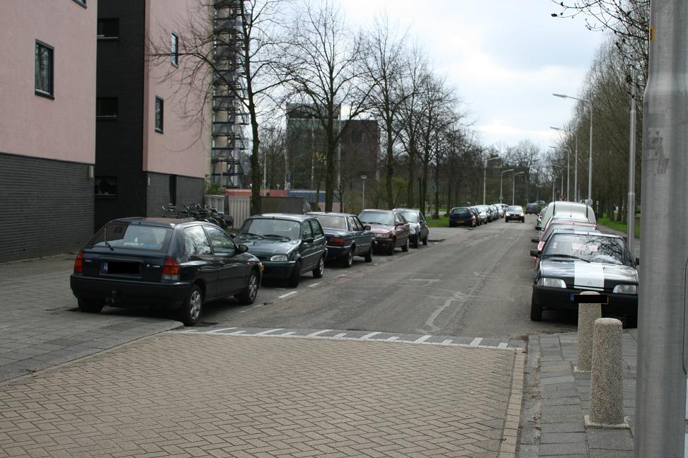 Parkverhalten in den Niederlanden. Autos dürfen hier trotz Gegenverkehr auch den linken Fahrbahnrand zum Parken benutzen. Dies ist auch z.B. in Österreich, Polen und Belgien zulässig.